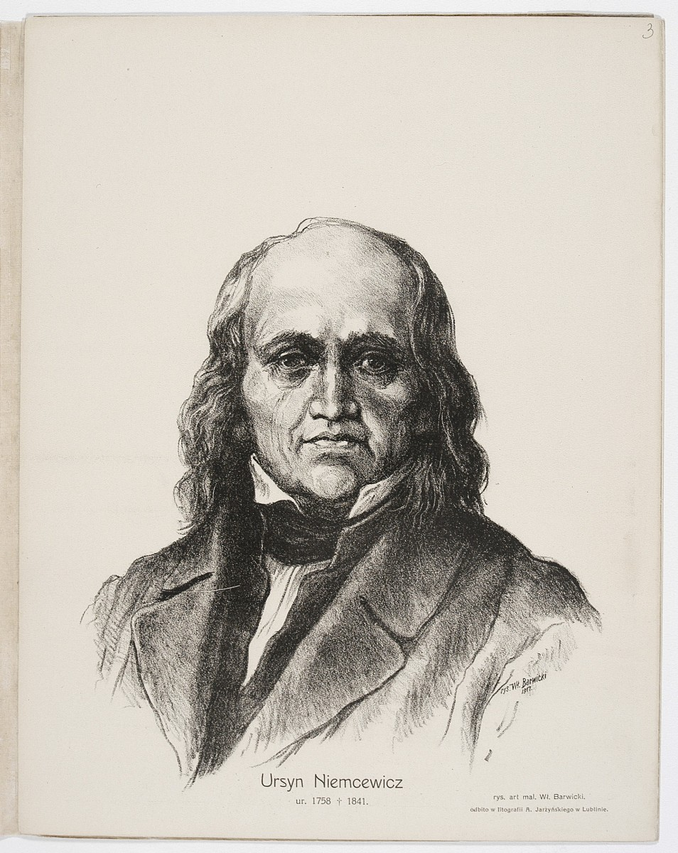 Ursyn Niemcewicz - a portrait from CBN Polona